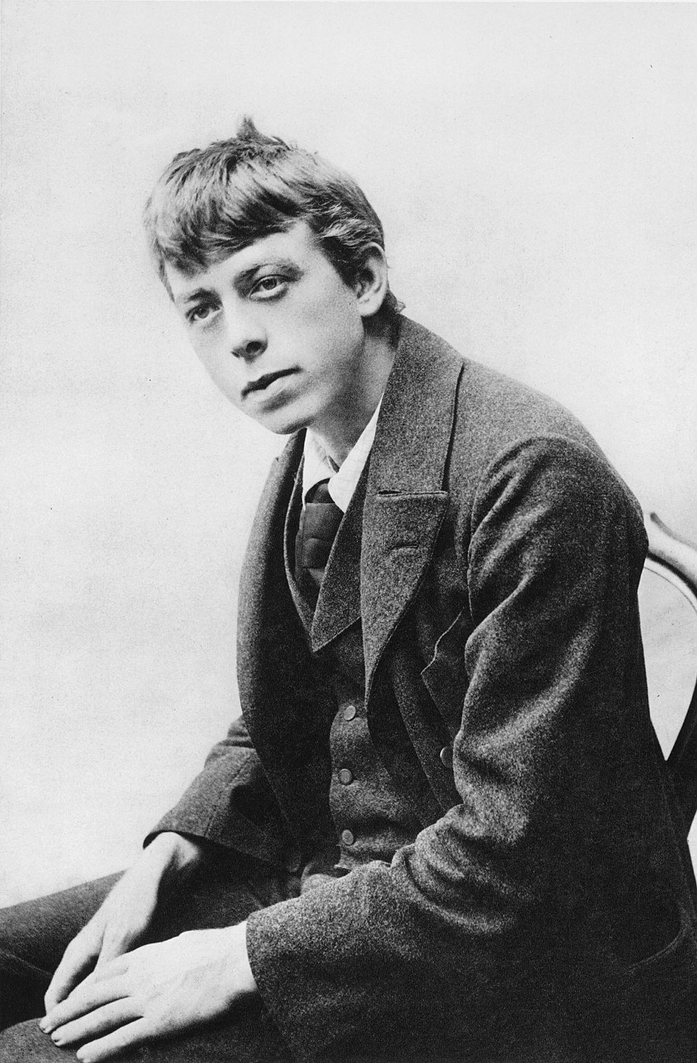 1SZ-175-B1895 (196919)Robert Walser / JugendbildnisWalser, Robert;schweizer. Schriftsteller;Biel, Kanton Bern 15.4.1878 -Herisau 25.12.1956.- Jugendbildnis. -Foto, Zürich, um 1900.F:Walser, RobertWalser, Robert ; écrivain suisse ; Biel, canton de Berne 15.4.1878 - Asile psychiatrique de Herisau, Appenzell 25.12.1956.- Portrait de Robert Walser jeune.